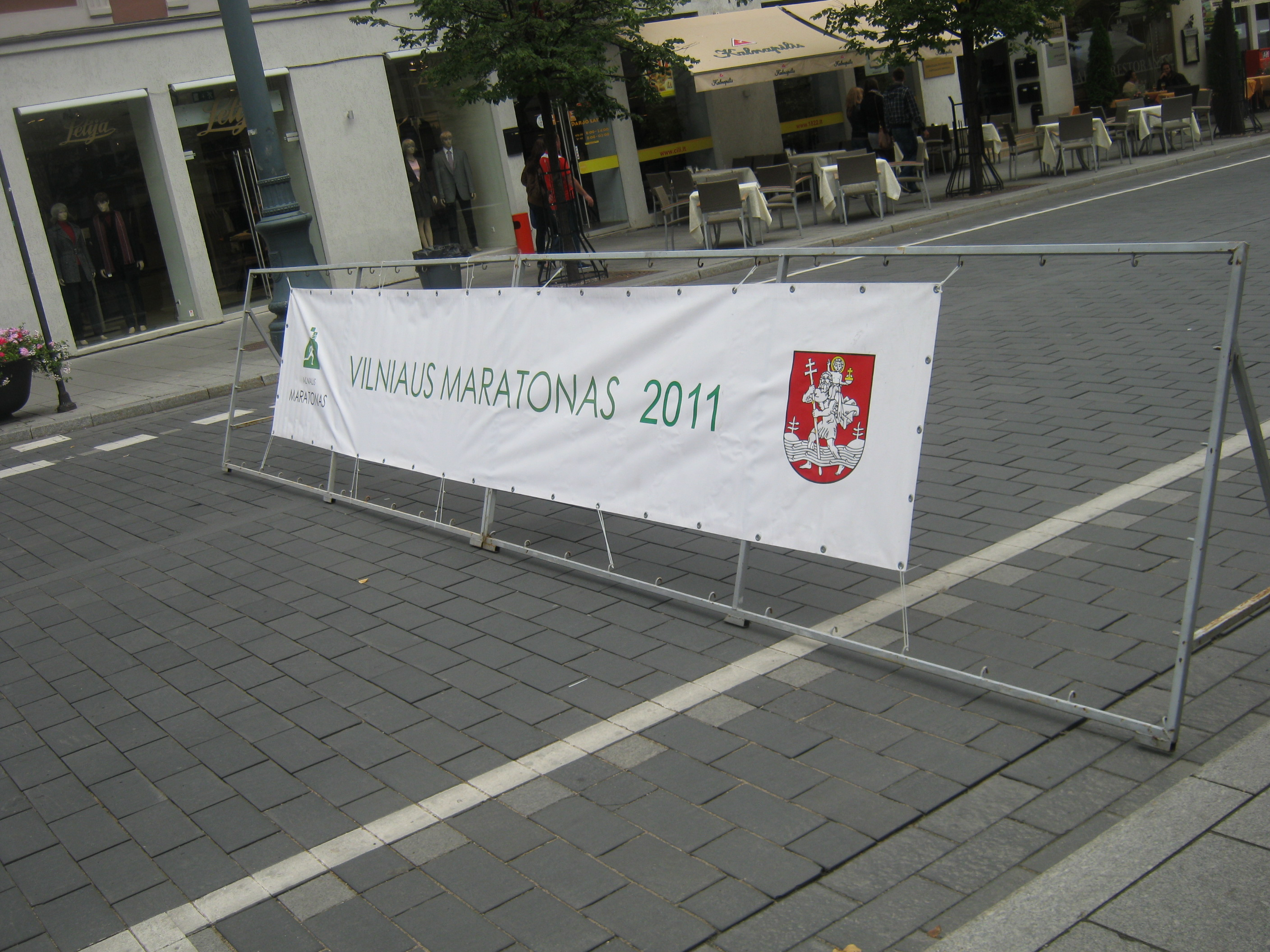 Vilniaus maratonas